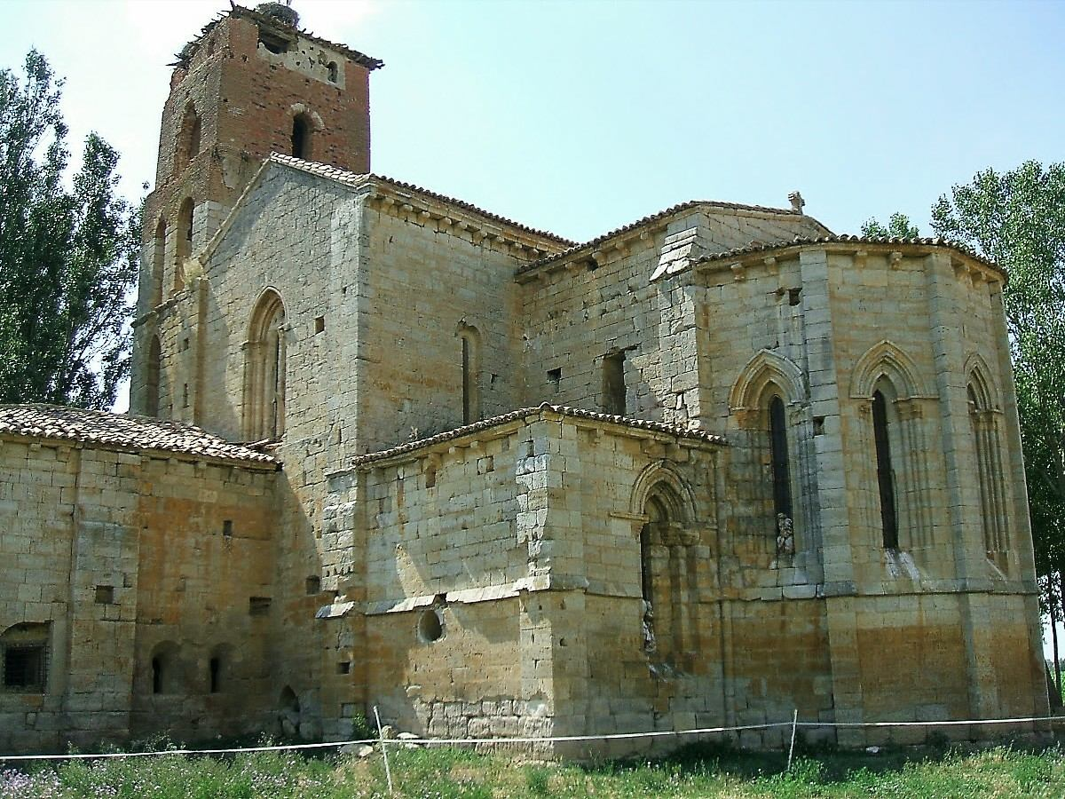 Iglesia del antiguo monasterio premonstratense de Santa Cruz de Ribas (Palencia, España)